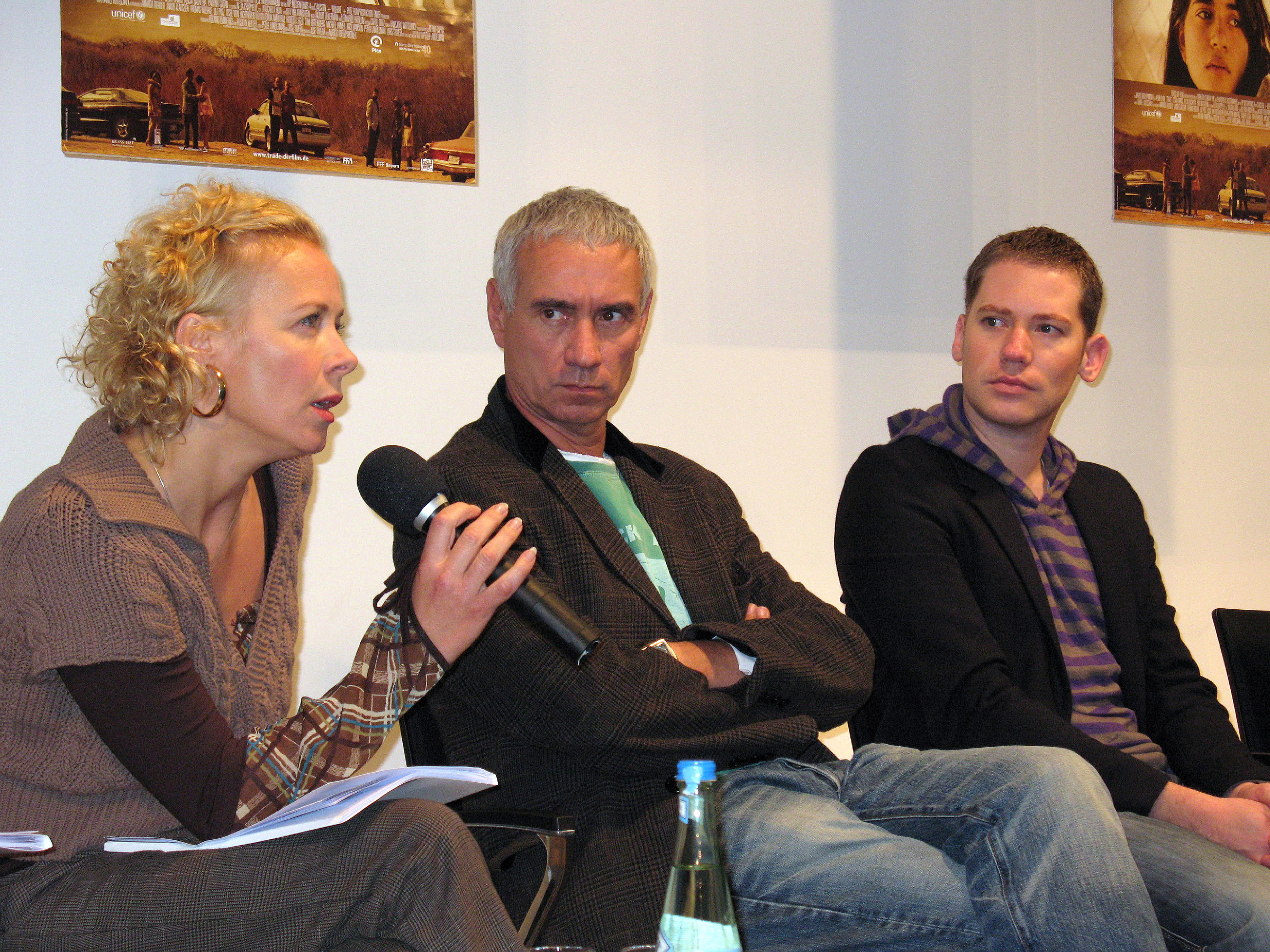 Katja Riemann (UNICEF Goodwill Ambassador), Roland Emmerich und Marco Kreuzpaintner bei der Pressekonferenz zur deutschen Filmpremiere Trade, Berlin, 11.10.2007